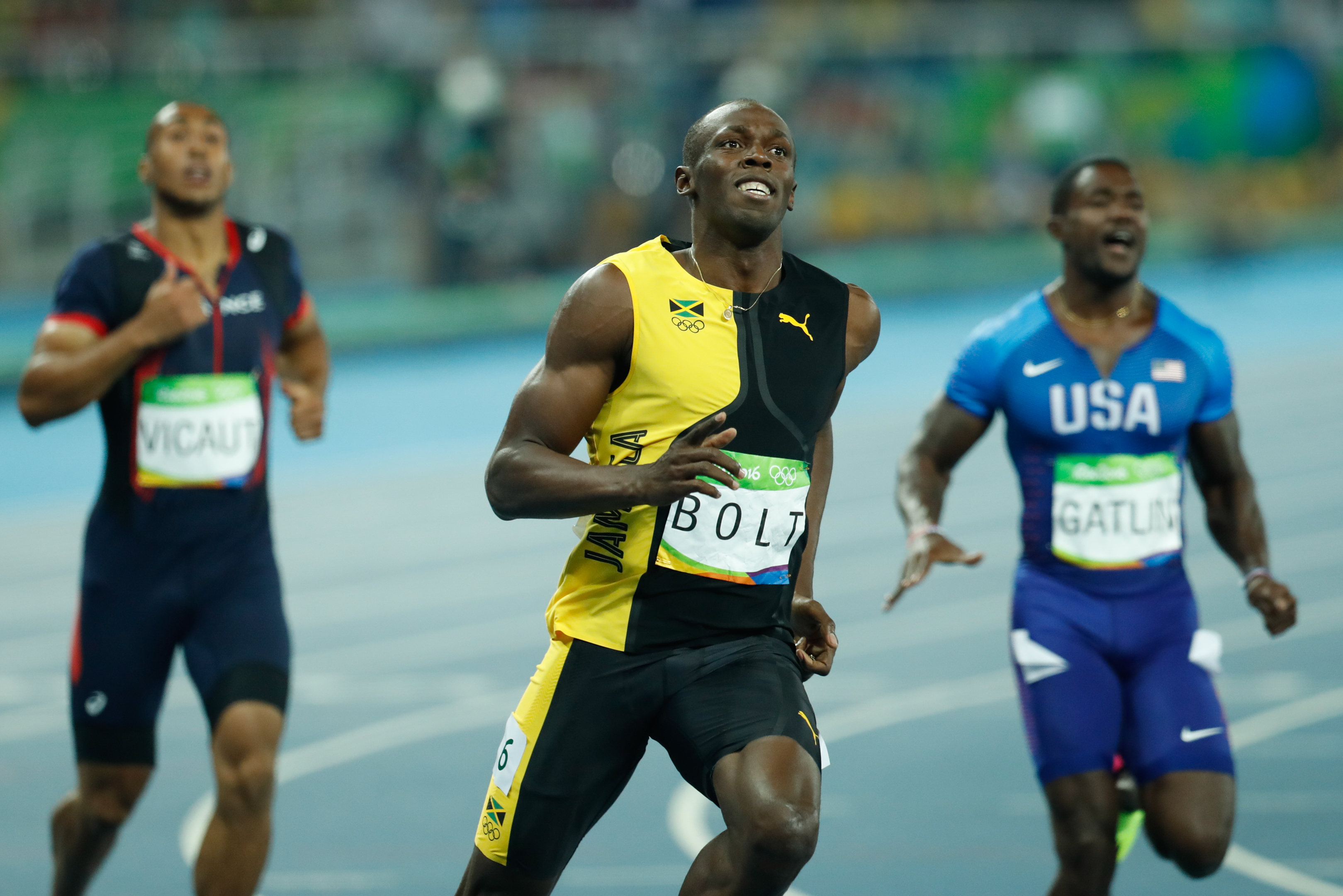 Rio de Janeiro - O jamaicano Usain Bolt, garantiu o ouro e fez história ao conquistar pela terceira vez o título de homem mais rápido do mundo nos 100 metros rasos em uma Olimpíada (Fernando Frazão/Agência Brasil).